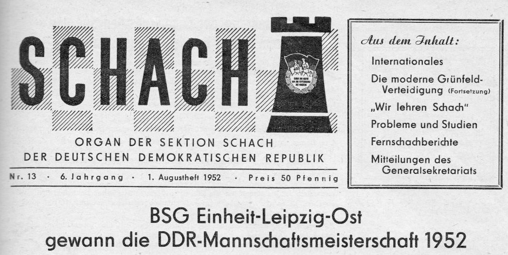 Titel der Schachzeitschrift Schach, 6. Jahrgang 1952, Heft 13.